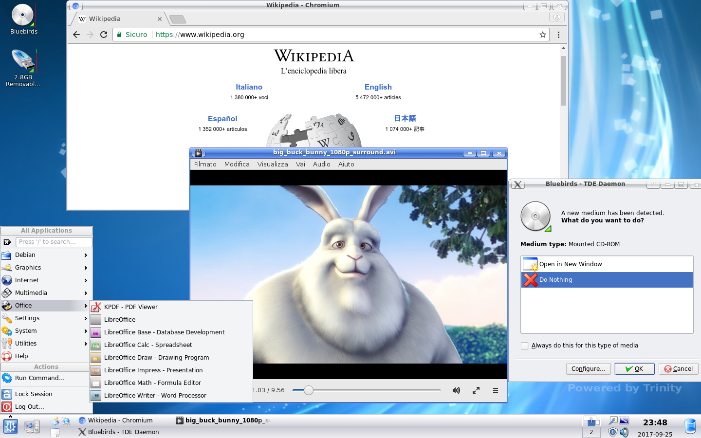 Snapshot/Screenshot su Trinity Desktop Environment R14.0.4, con TDE Menu aperto.